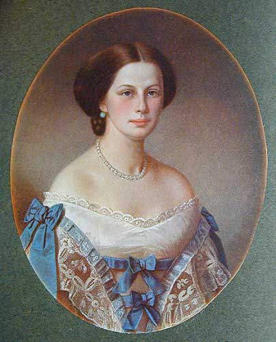 Anna Pavlovna Filosovova